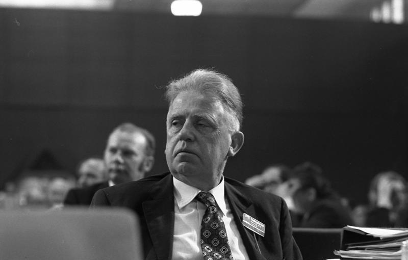 Bundesparteitag der SPD in Hannover (Alfred Nau) 10.-14.4.1973